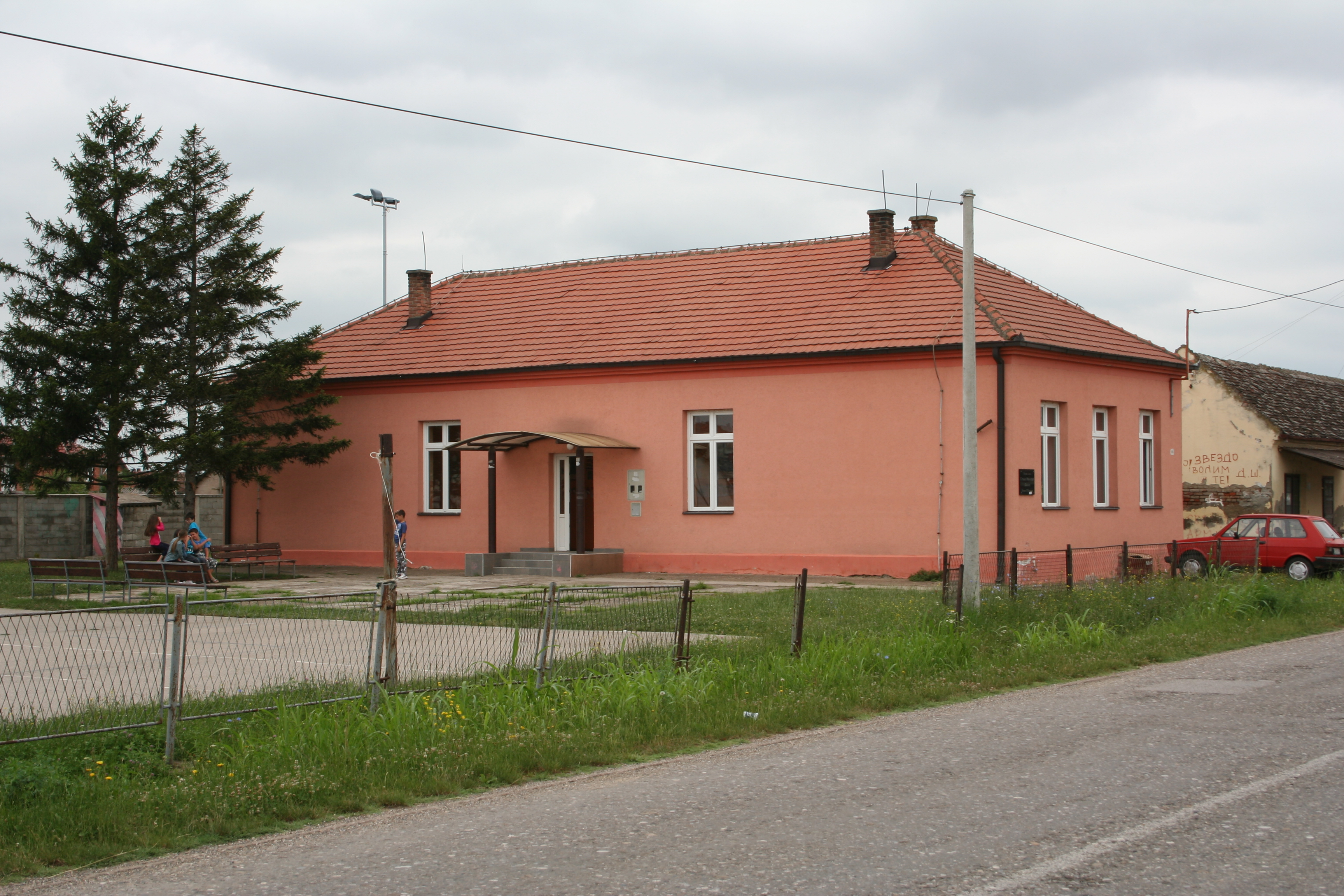 Zgrada seoske škole, Pričinović